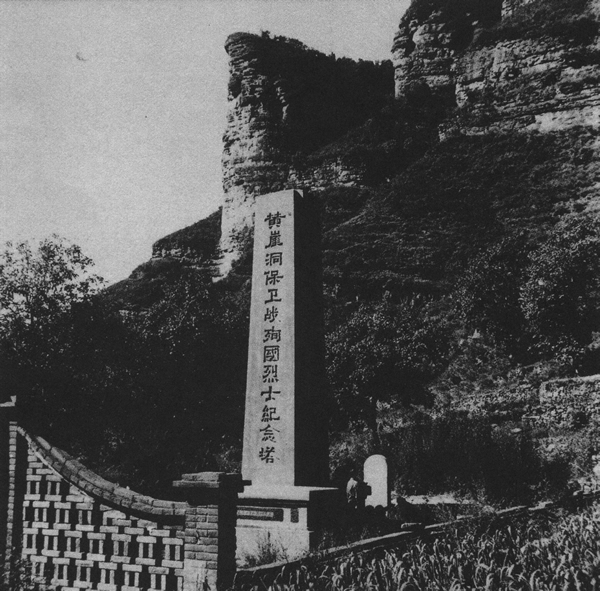 1941年11月，日军围攻晋东南黎城北黄崖洞兵工厂，八路军总部特务团与日军激战5昼夜，毙伤日军700余人，取得黄崖洞保卫战的胜利。图为黄崖洞保卫战烈士纪念塔